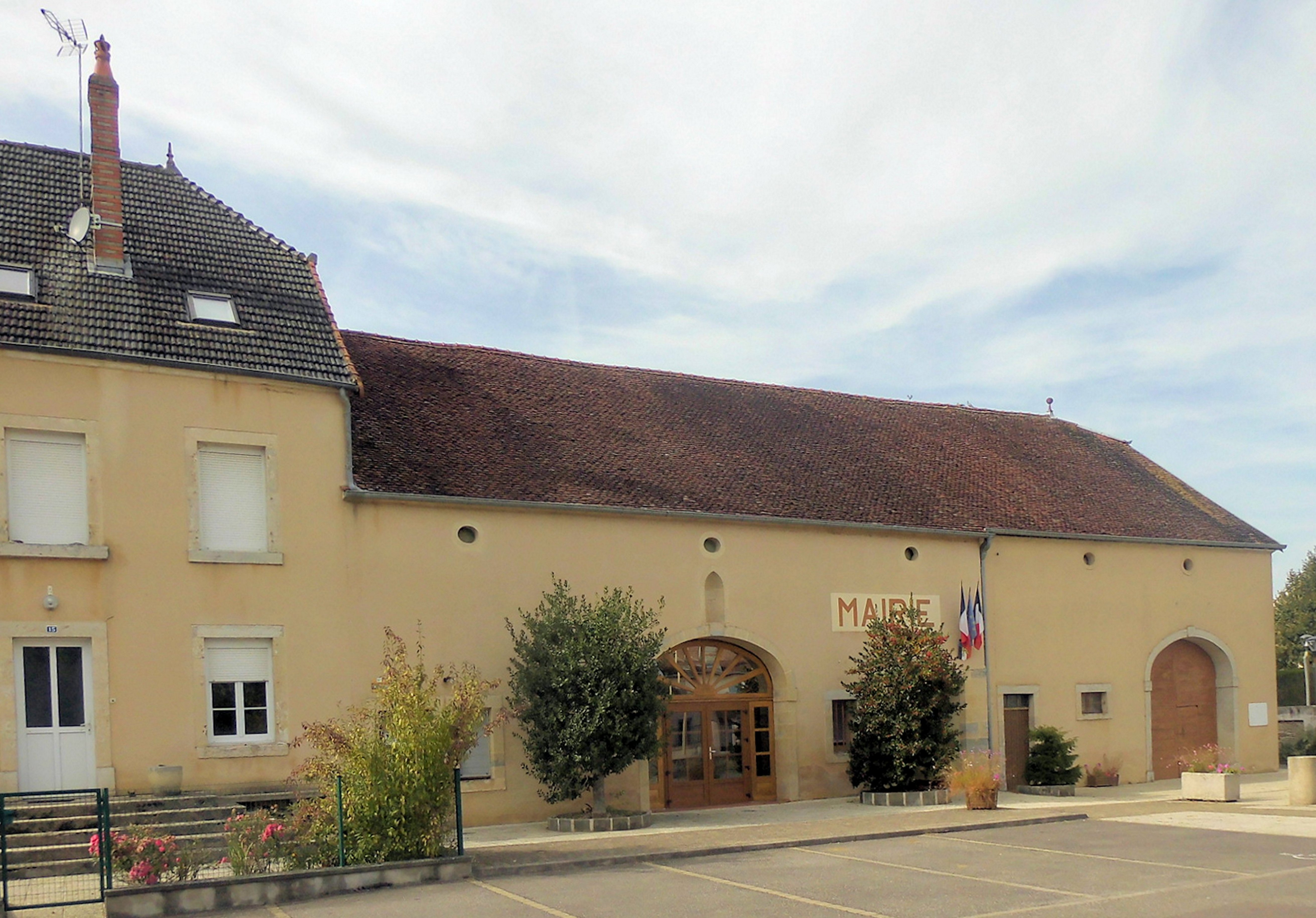 La mairie deBougnon